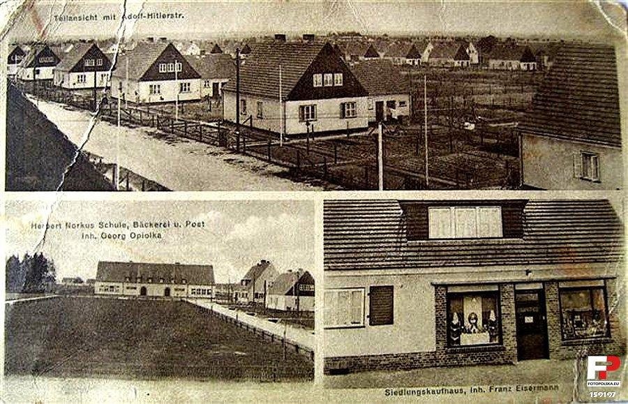 Brzezinka